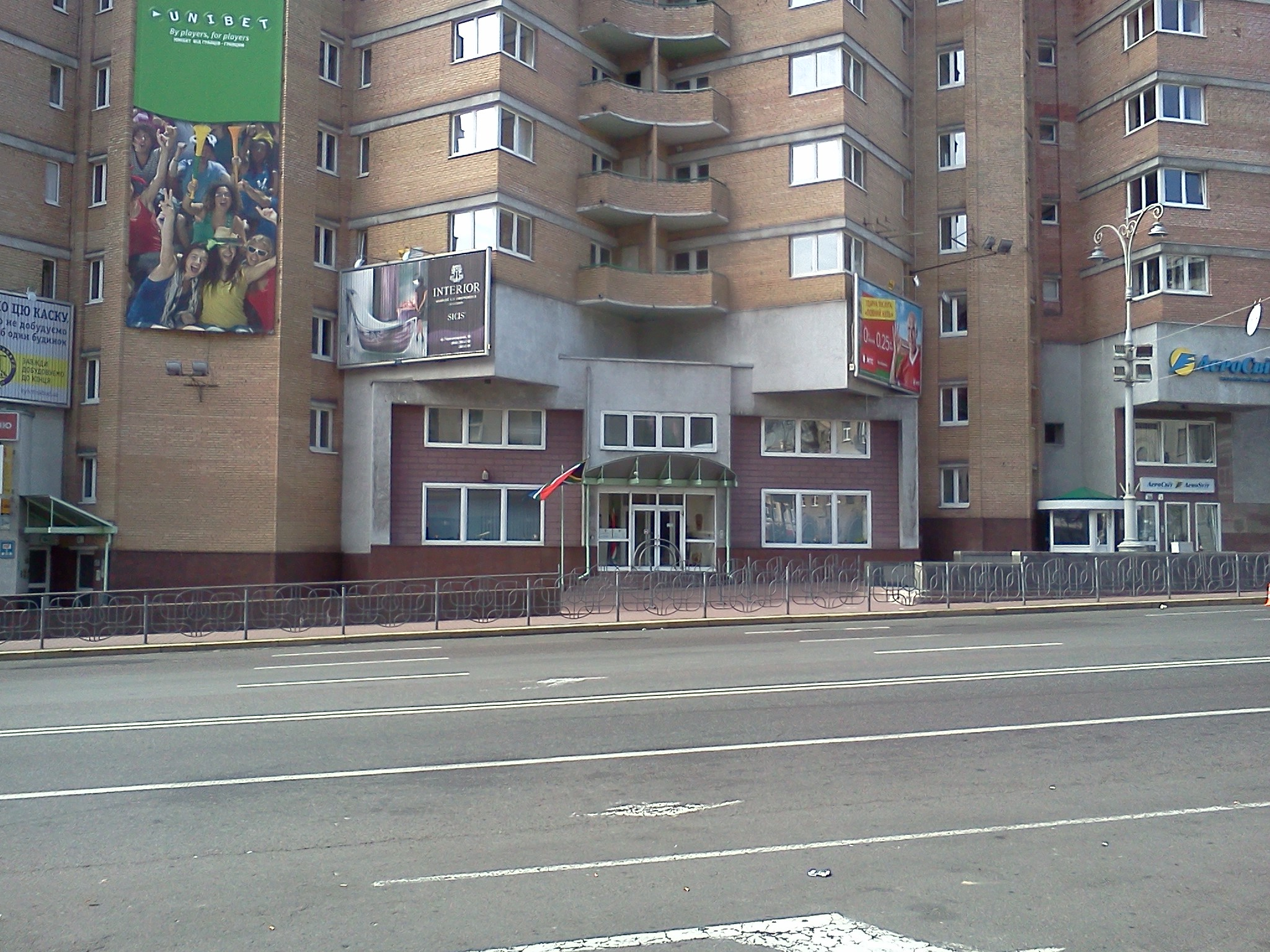 Посольство ПАР в Києві